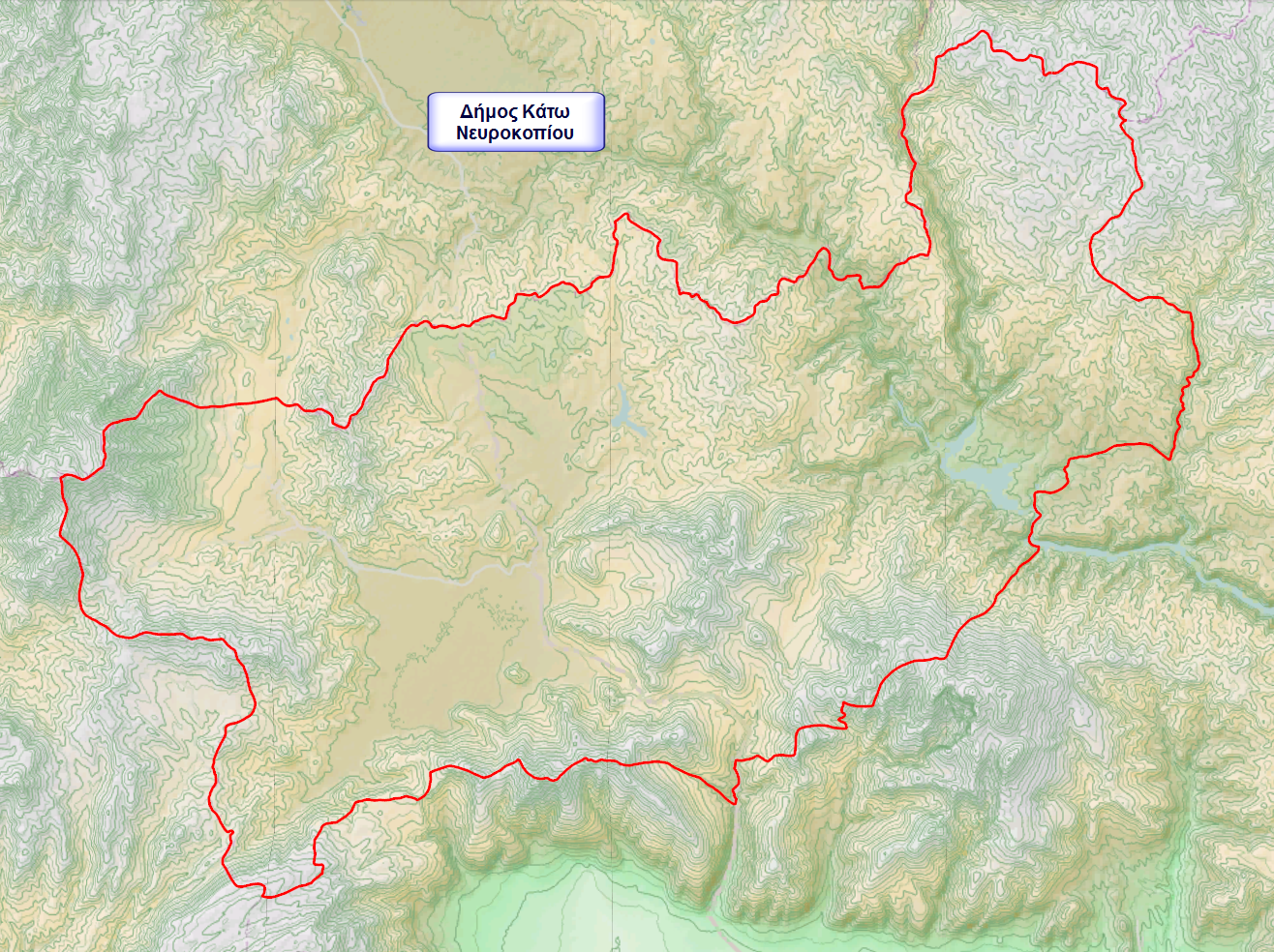 Τοπογραφικός χάρτης του Δήμου Κάτω Νευροκοπίου (2011)